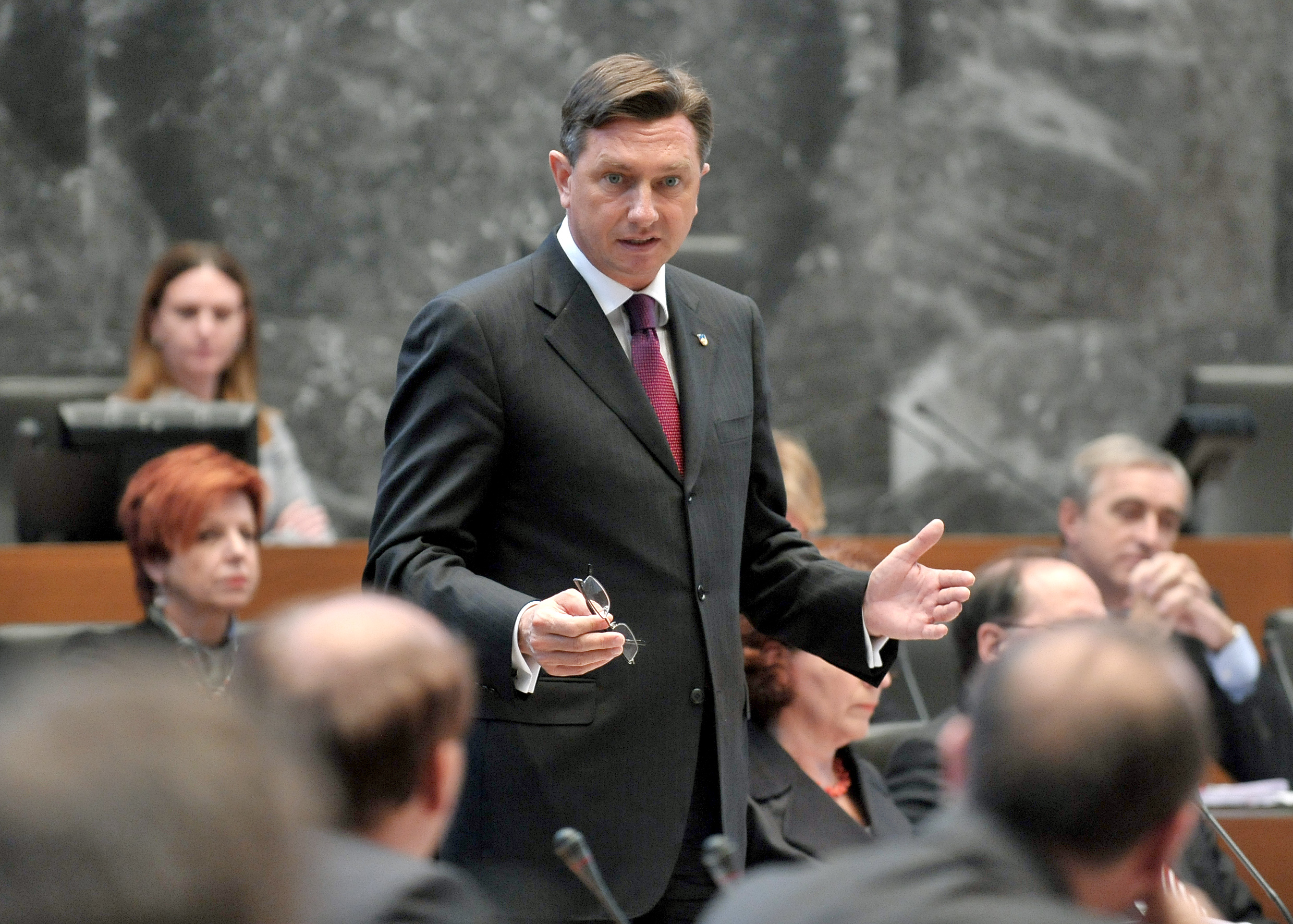 Borut Pahor v parlamentu leta 2010